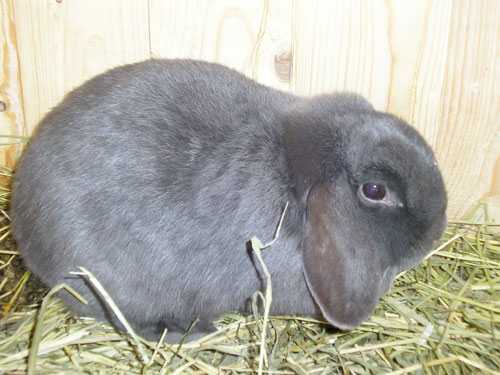 Blå dvergvedder.